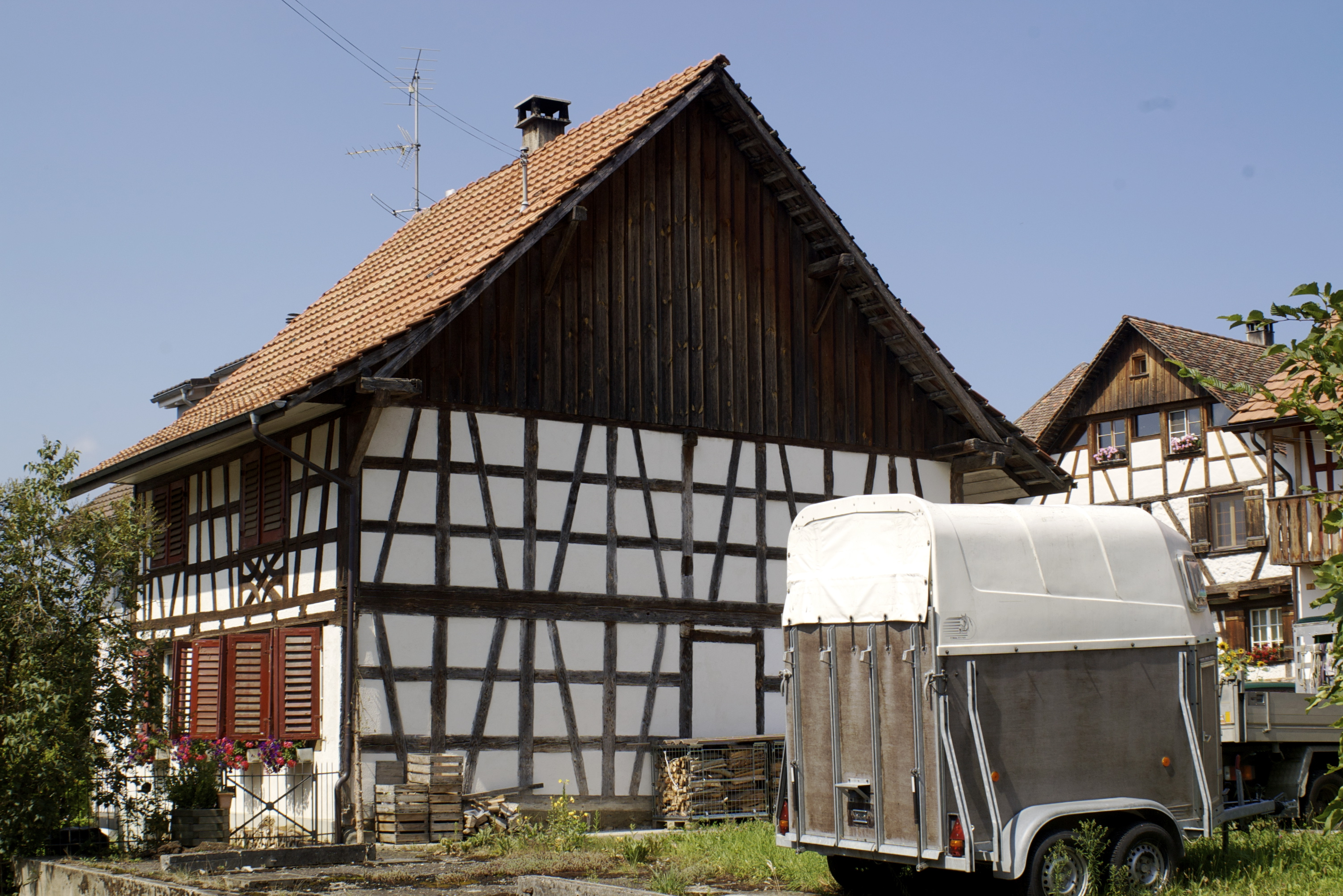 Häuser im Ortskerne von Lustorf; rechts vorne ein Pferdeanhänger.